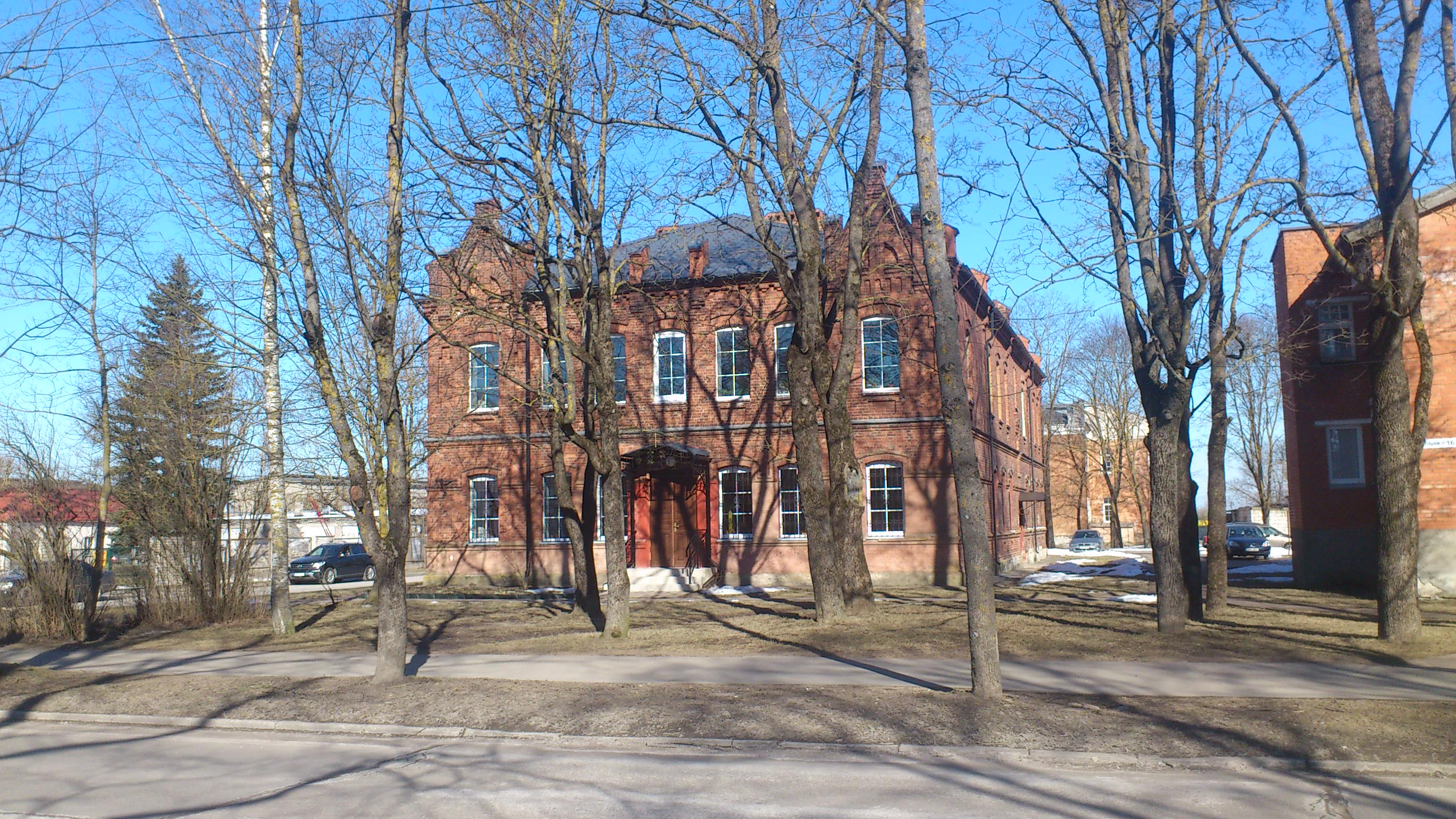 Narva Püha Antoniuse kabel